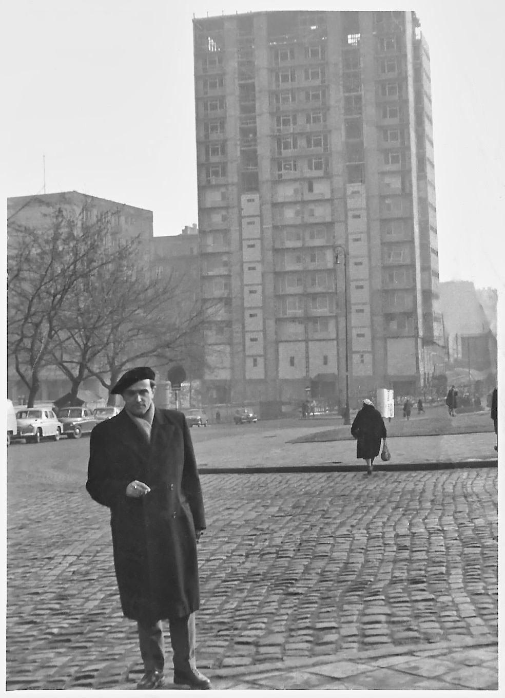 ALFRED PRZYBYLSKI 1958r ul.Tamka 49 Warszawa